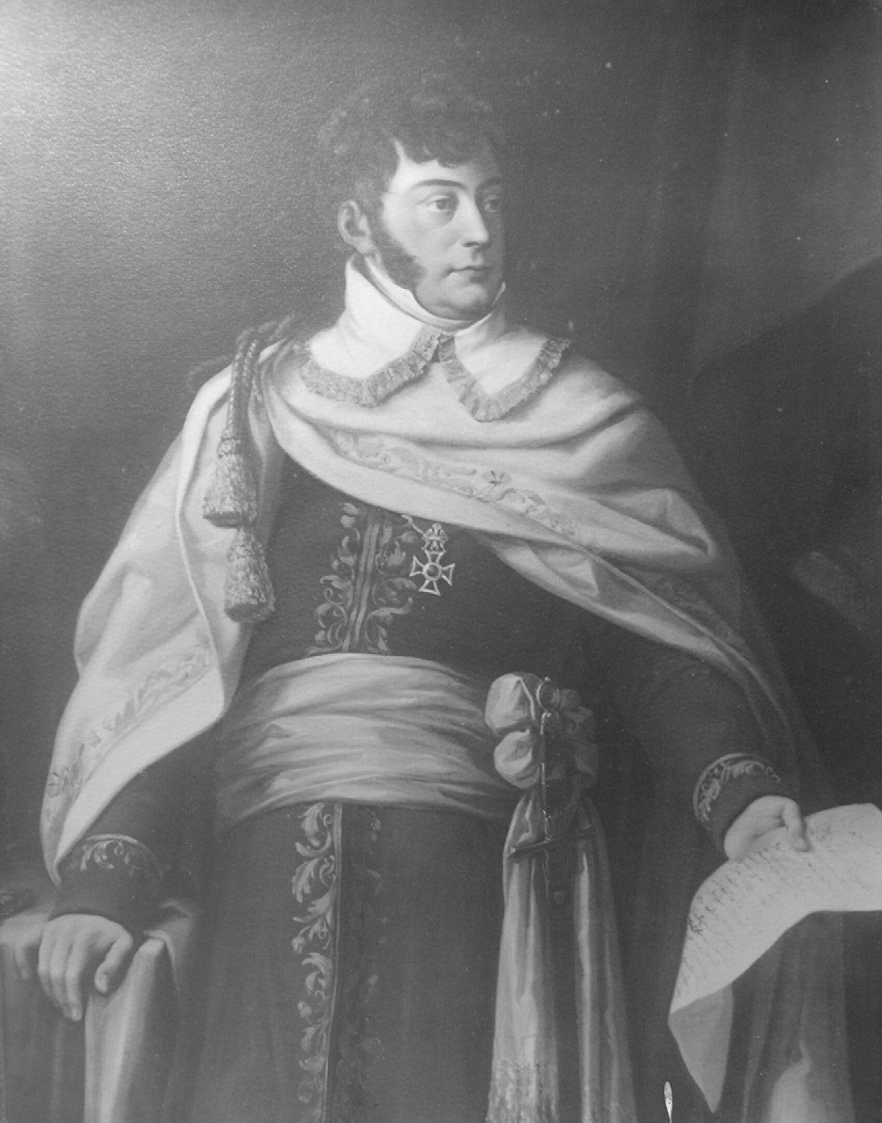 Christian Christoph Graf von Clam-Gallas; Kristián Kryštof Clam-Gallas